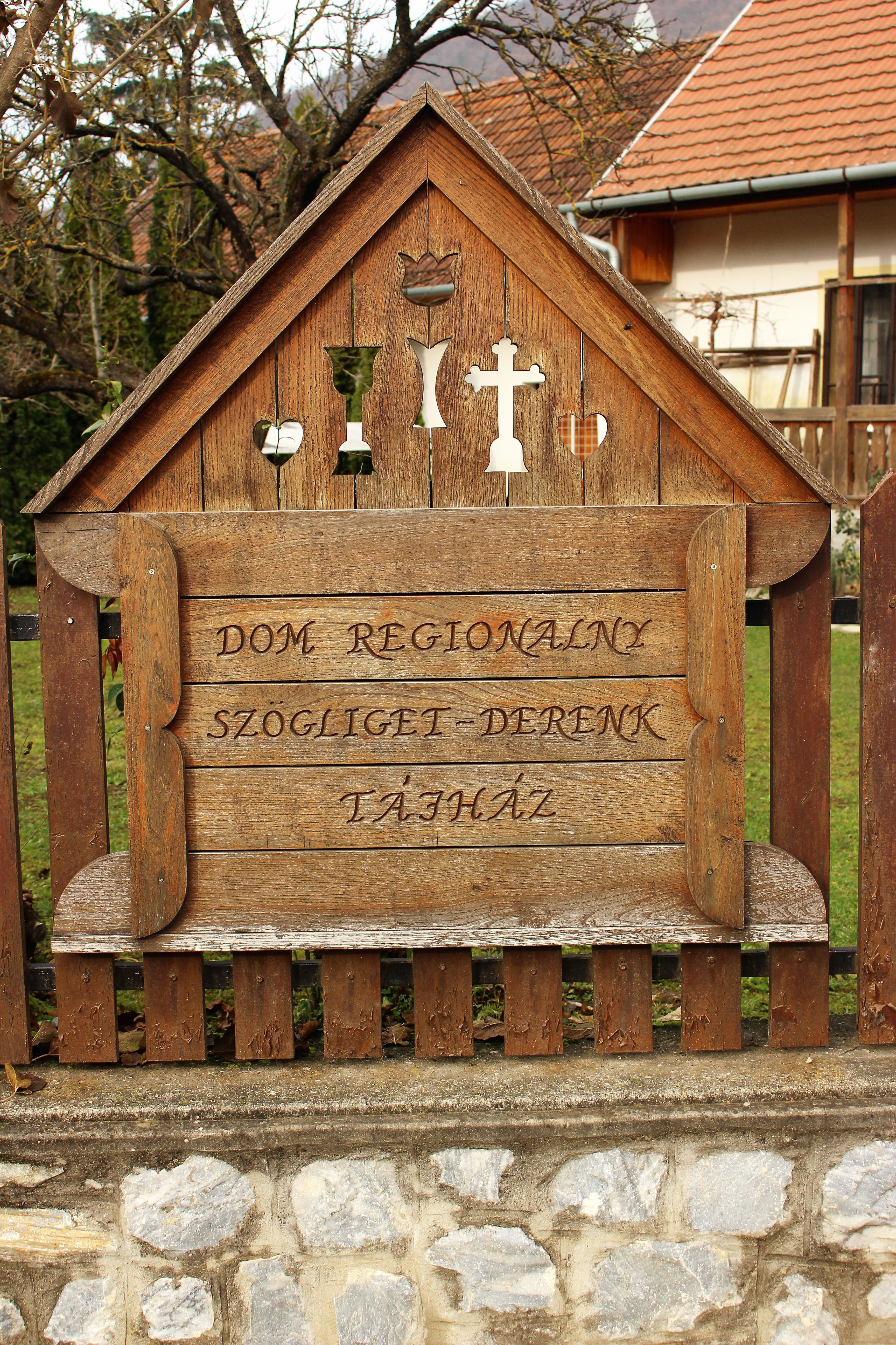 Dom Regionalny Szögliget - Derenk. Zamiejscowy oddział Polskiego Instytutu Badawczego i Muzuem w Budapeszcie